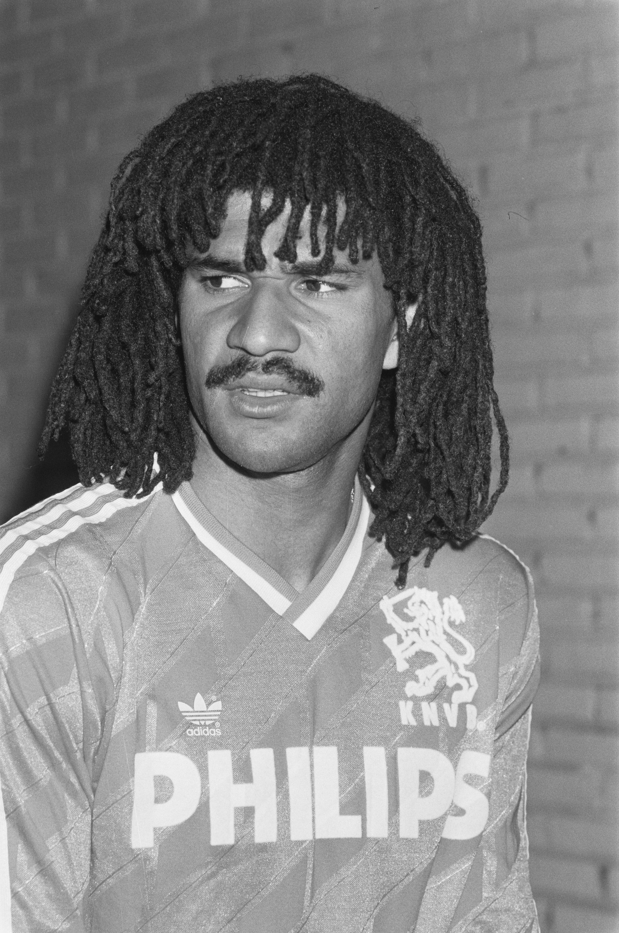 Collectie / Archief : Fotocollectie Anefo Reportage / Serie : [ onbekend ] Beschrijving : Selectie Nederlands elftal in Zeist; Ruud Gullit , kop Datum : 21 maart 1988 Locatie : Utrecht, Zeist Trefwoorden : sport, voetbal Persoonsnaam : Gullit, Ruud Fotograaf : Croes, Rob C. / Anefo Auteursrechthebbende : Nationaal Archief Materiaalsoort : Negatief (zwart/wit) Nummer archiefinventaris : bekijk toegang 2.24.01.05 Bestanddeelnummer : 934-2142